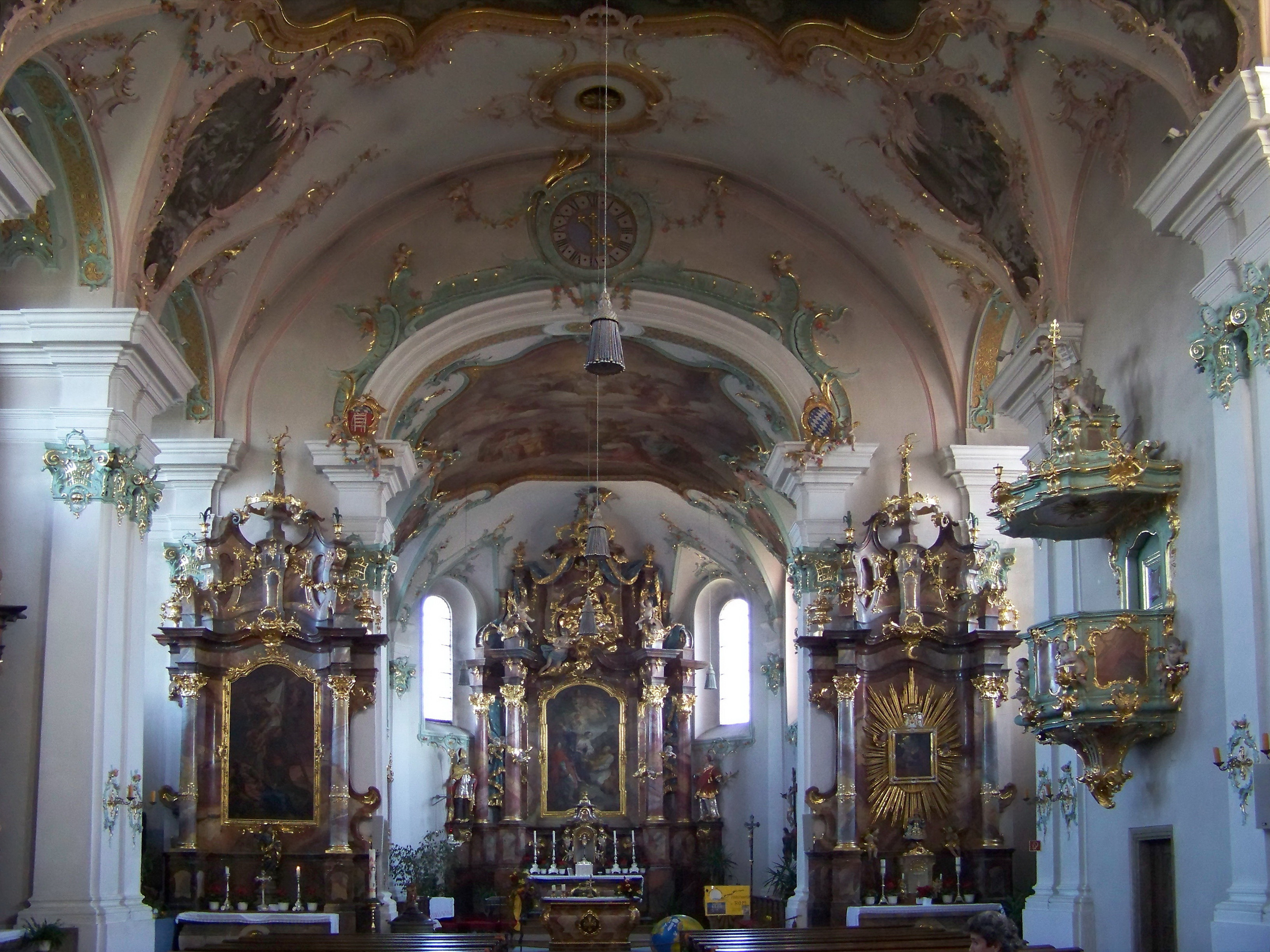 Geiselhöring. Katholische Stadtpfarrkirche St. Petrus und Erasmus. Barockes Langhaus, 1761-64 von Georg Fischer, Chor und Turmuntergeschosse mittelalterlich, Obergeschoss 1776; mit Ausstattung.